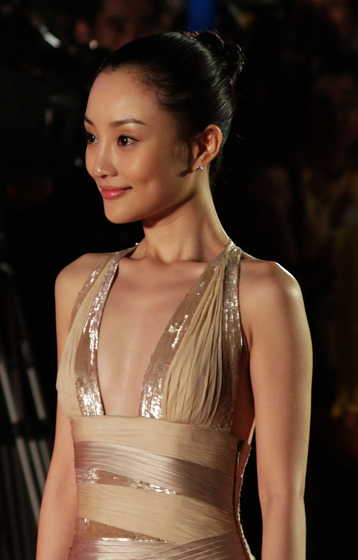 Ли Сяолу TV Festival 2007